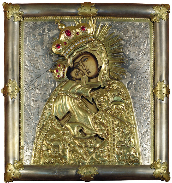 Славуты ласкамі абраз Маці Божай у Гудагаі, упрыгожаны каронамі.